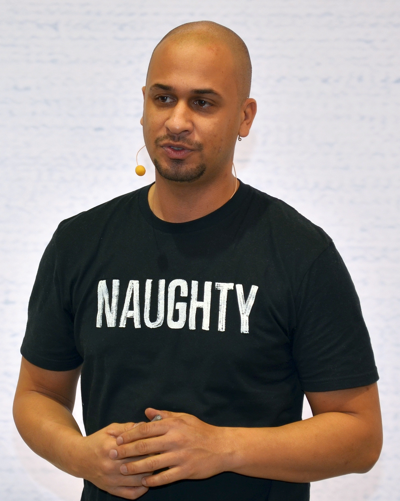 Jean Pierre Kraemer @ Motorshow Essen 2013